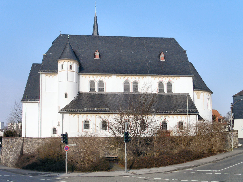 Beschreibung: St. Clemenskirche in Bergisch Gladbach - Paffrath Quelle: selbst fotografiert am 12. Januar 2006 Fotograf: Jan Wellem